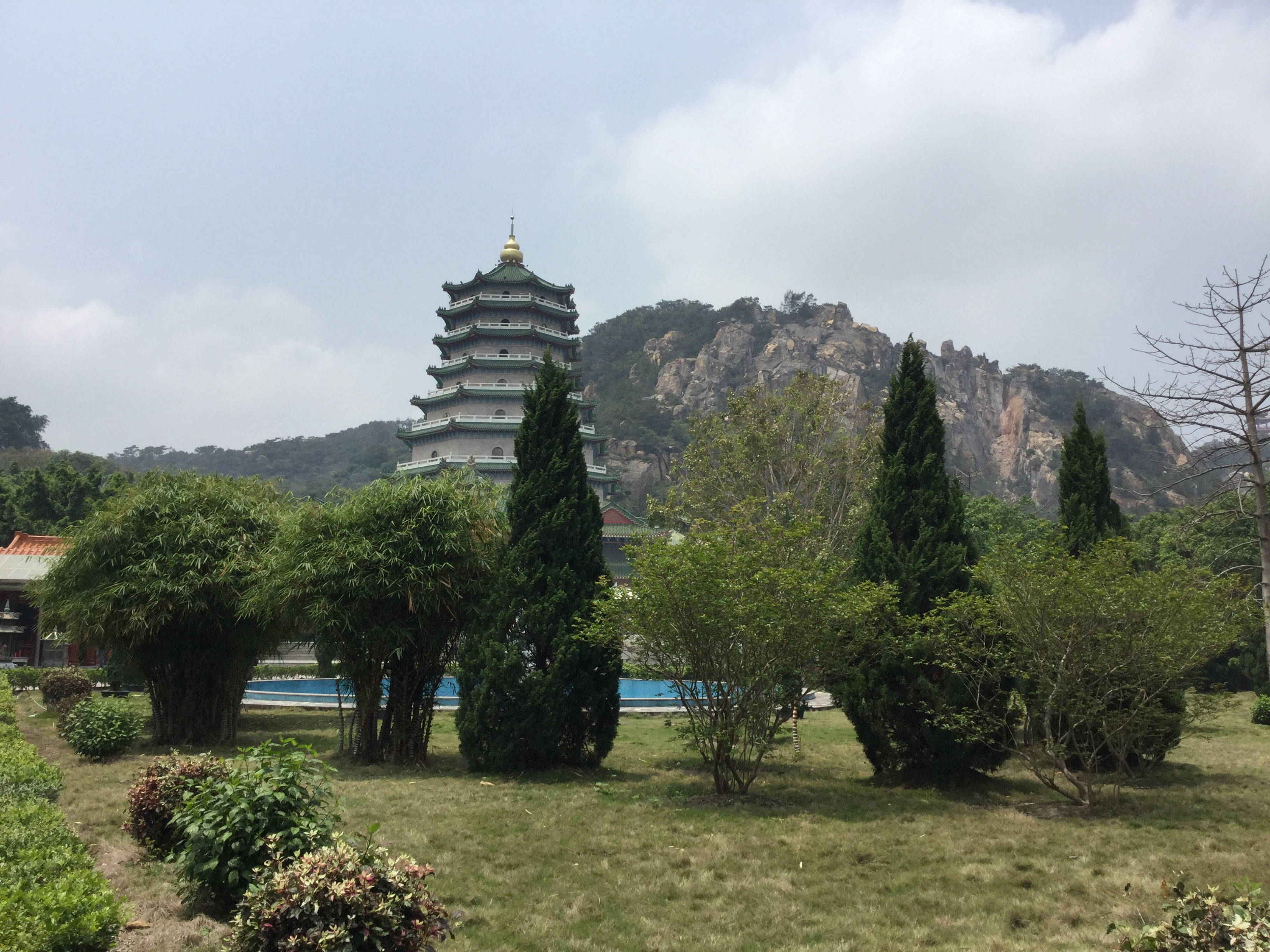 中文（中国大陆）: 园林区，汕头天坛花园